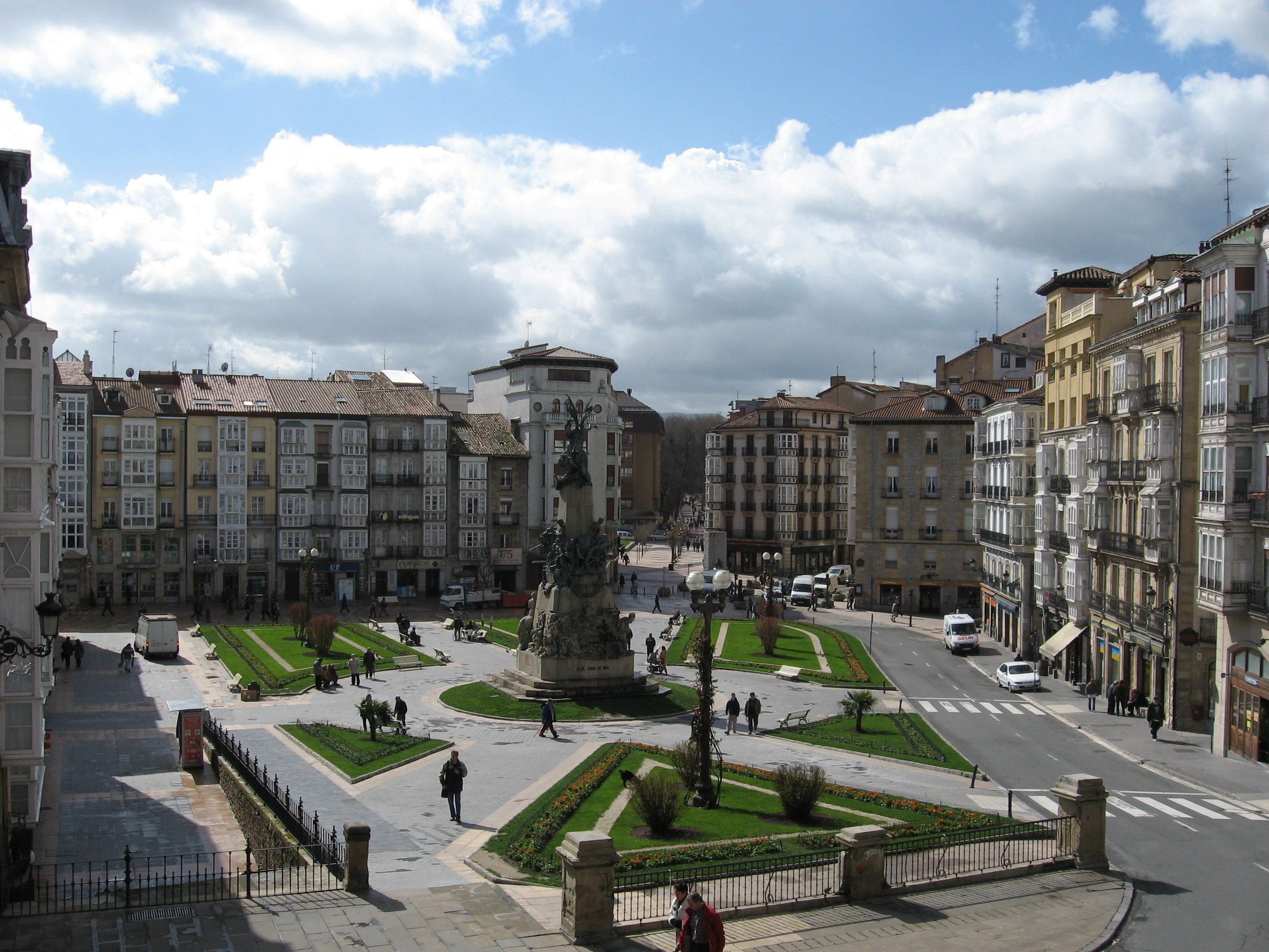 Desc: Plaza de la Virgen Blanca vista desde San Miguel